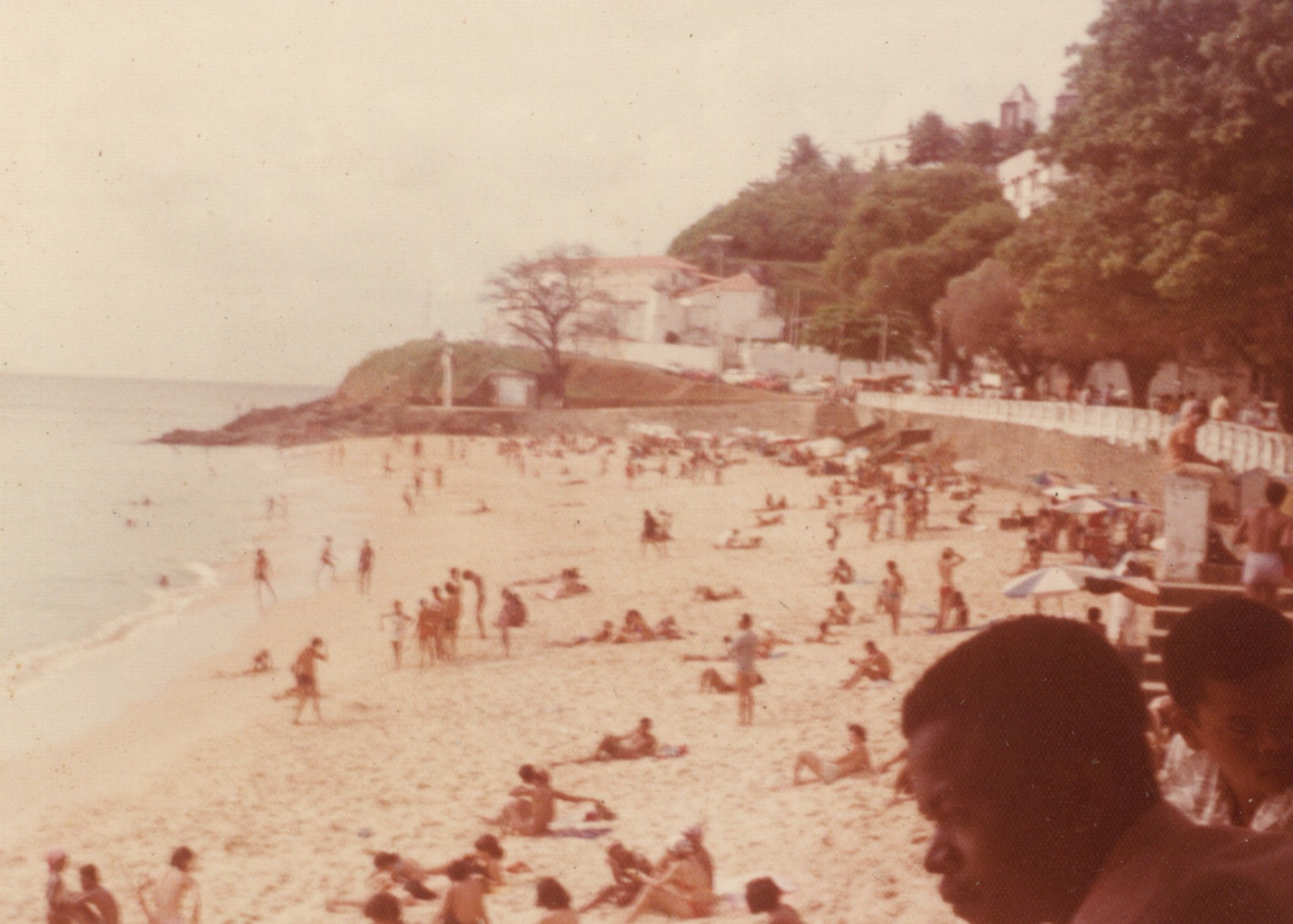 Porto da Barra, na década de 70.